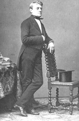 Carl Roesner. Foto, um 1860.